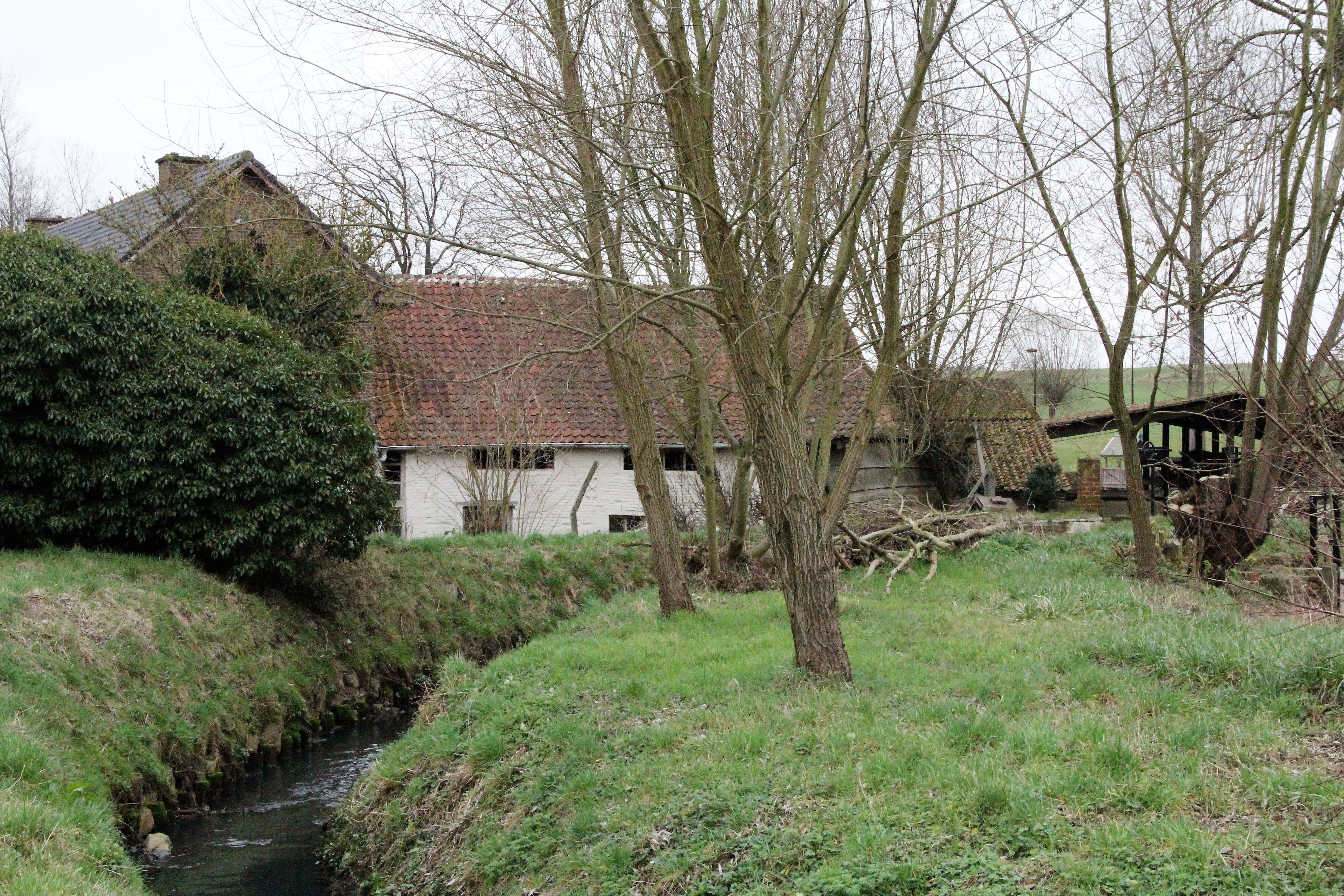 Klapscheutstraat 41, 1741 Wambeek - Klapscheutmolen (2)